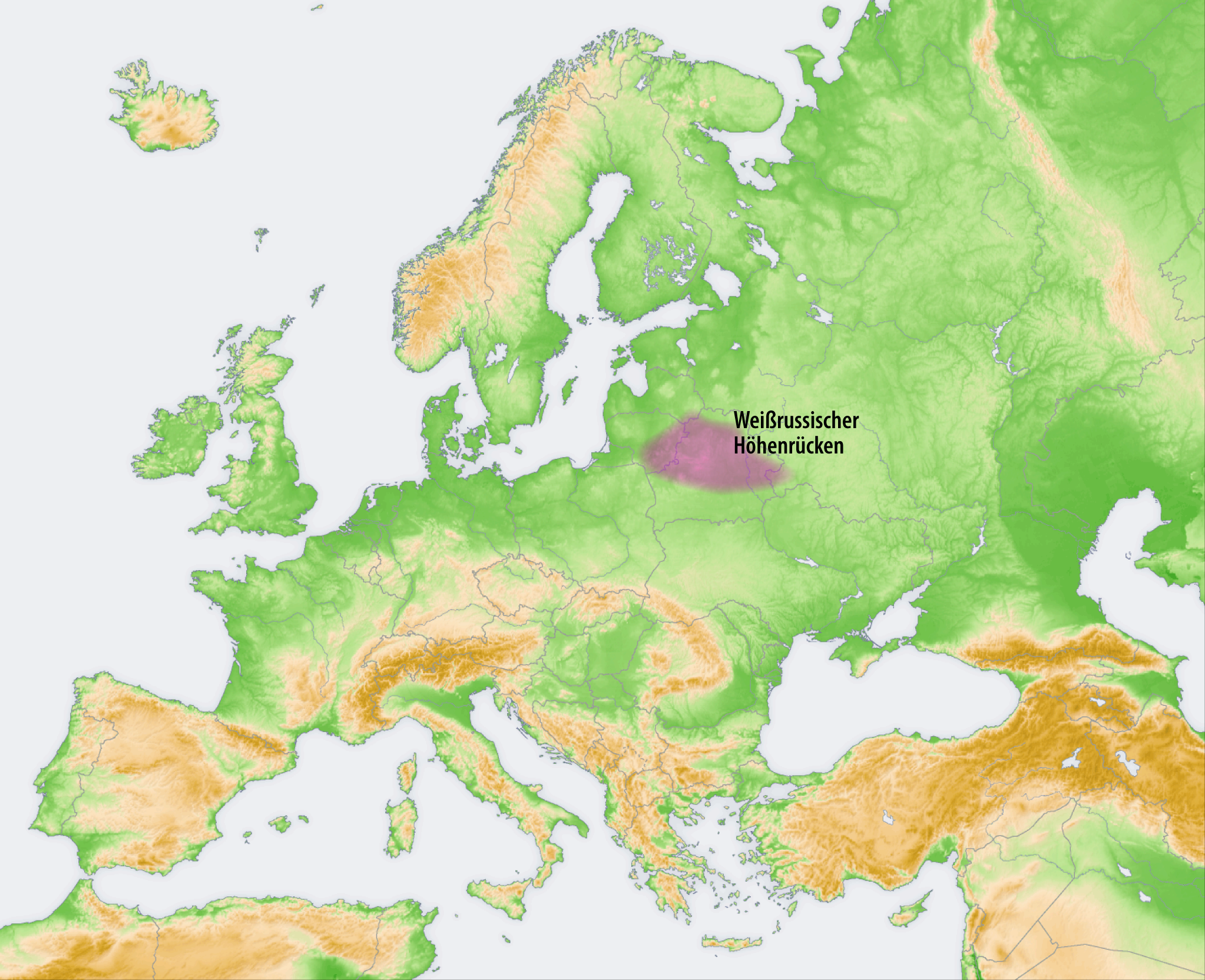 Landschaften der Osteuropäischen Ebene: Weißrussischer Höhenrücken